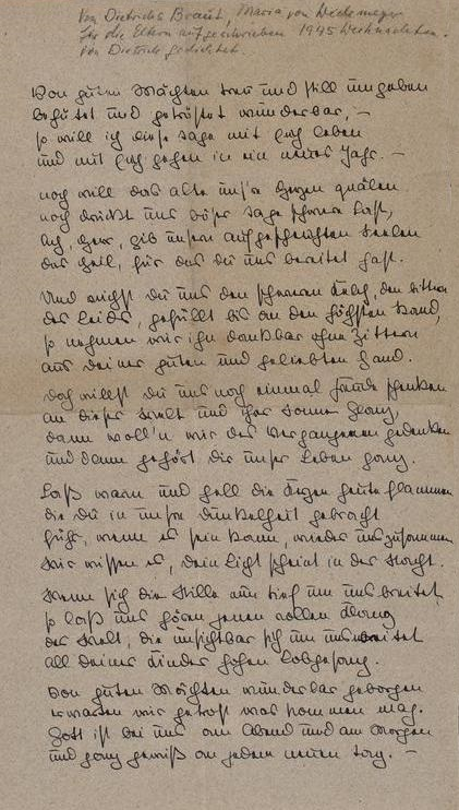 Maria von Wedemeyer: Abschrift des Gedichtes Von guten Mächten von Dietrich Bonhoeffer aus seinem Brief an sie vom 19. Dezember 1944